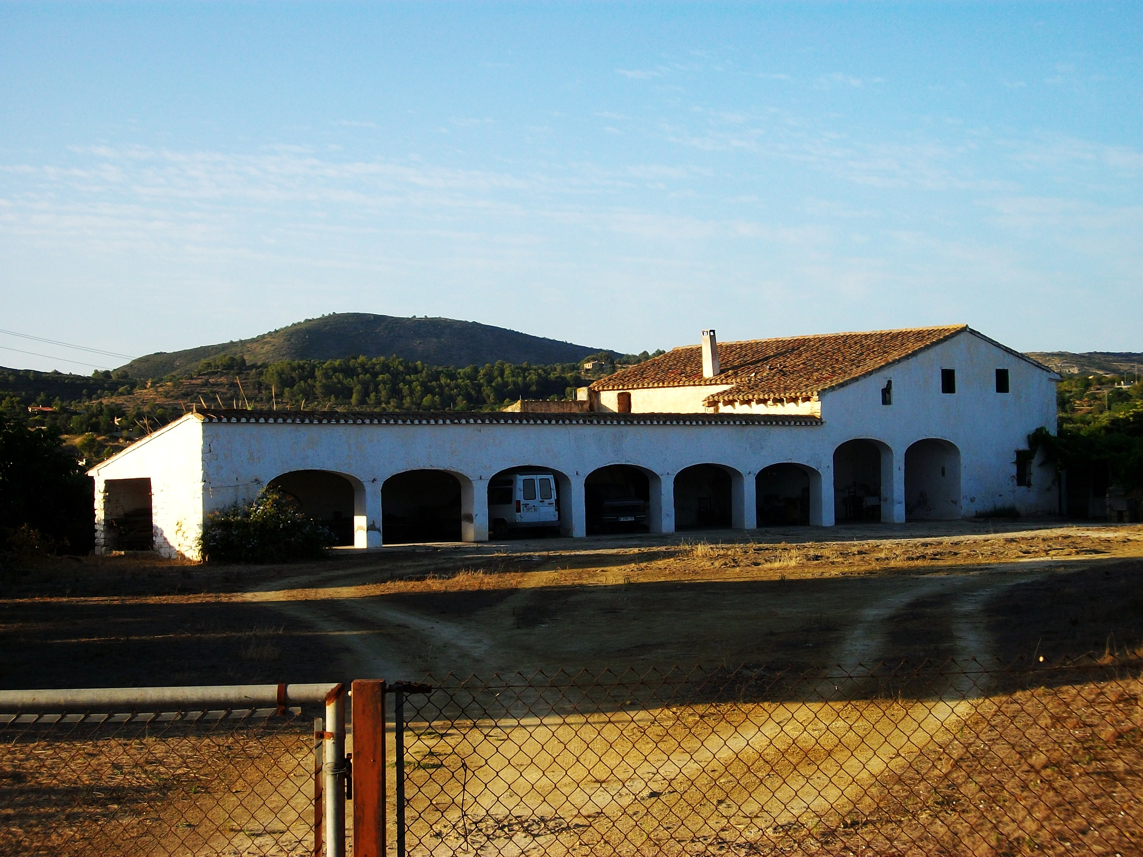 Riurau de Ferrandet, Benissa, Marina Alta, País Valencià.